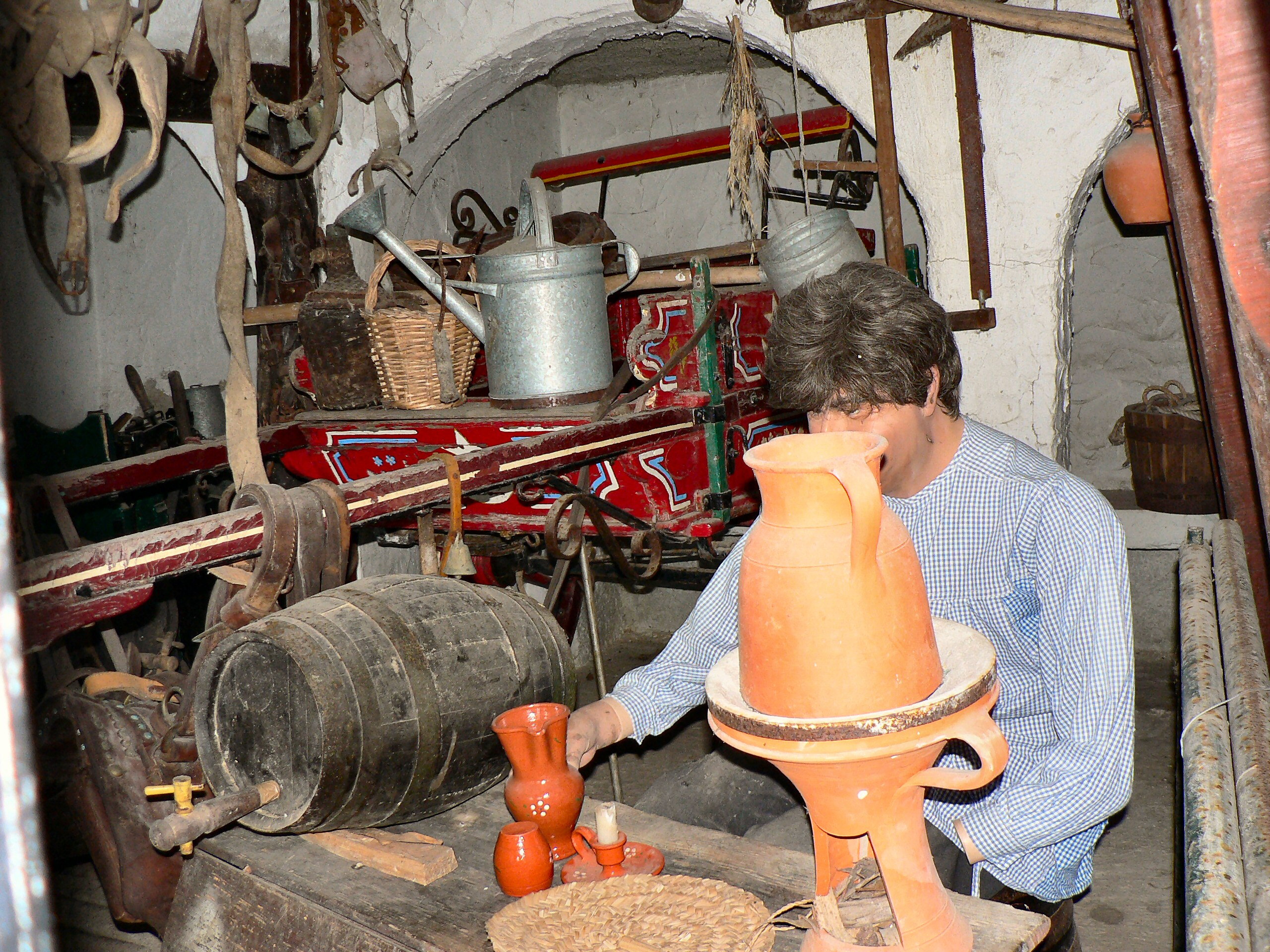 A taberna na Aldeia típica de José Franco Autor: Paulo Juntas